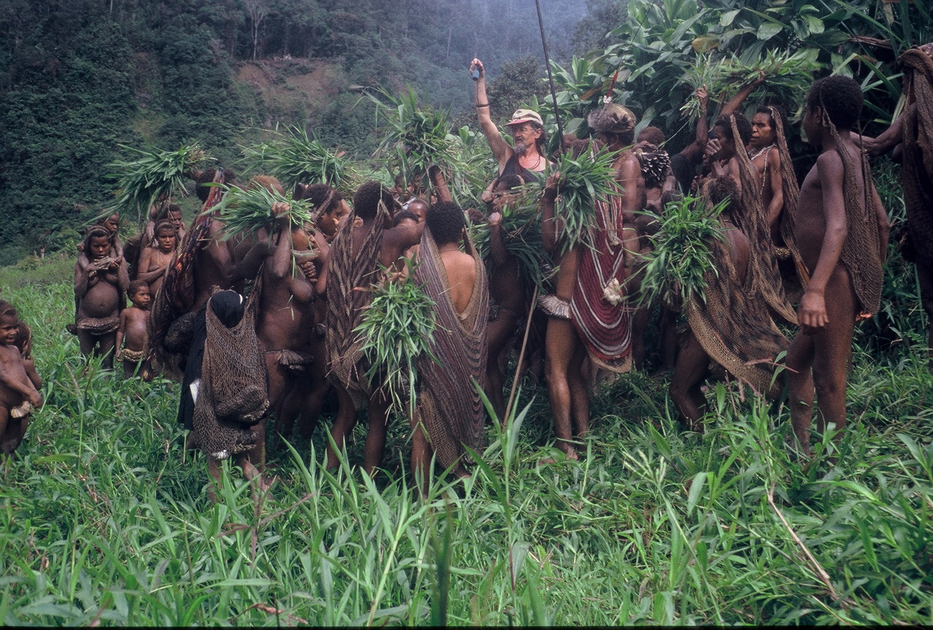 Der Musiker und Komponist Gunter Lege in West Papua ...